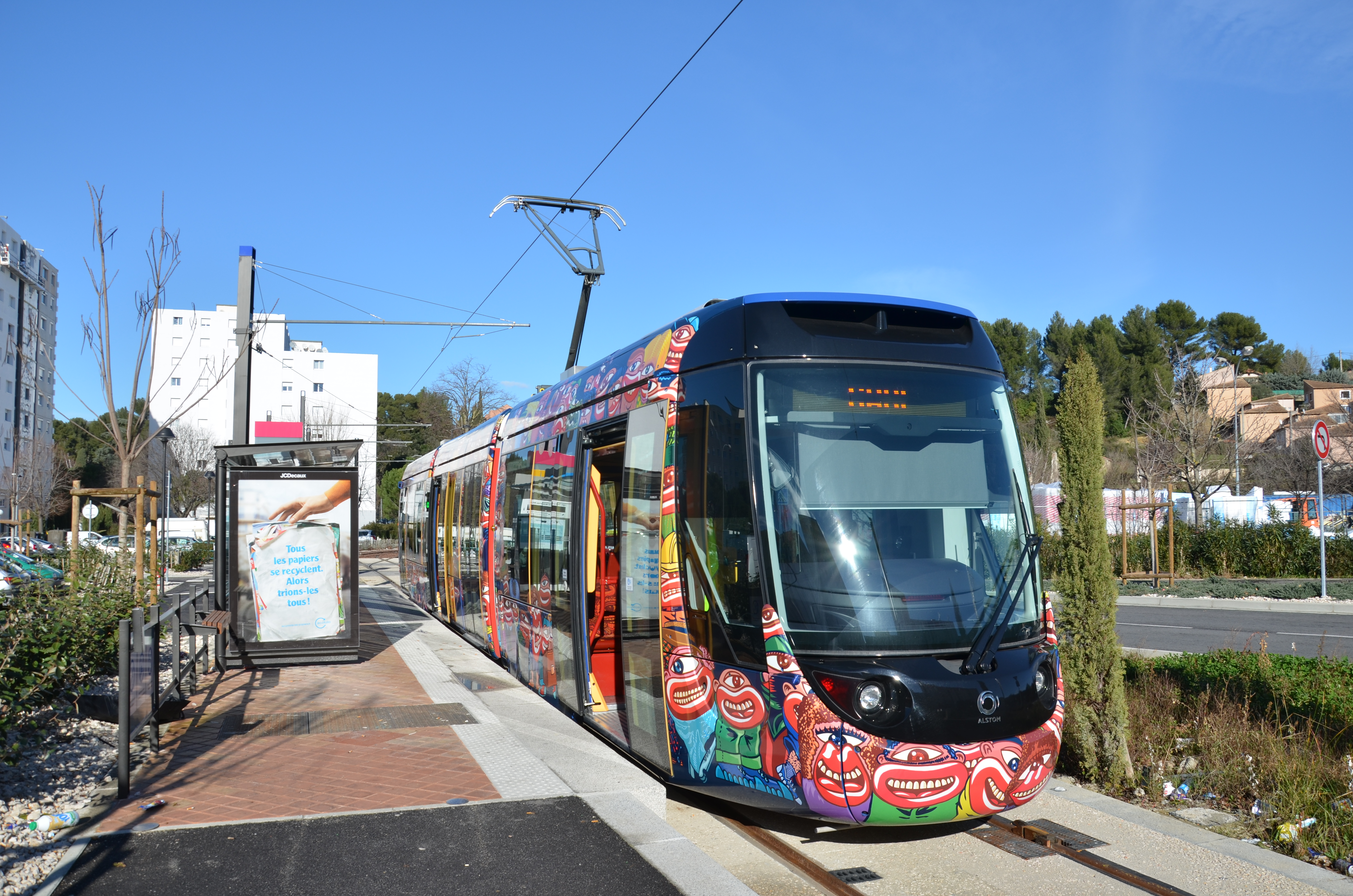 Alstom Citadis Compact en attente de départ en direction de la Gare d'Aubagne, à son terminus Le Charrel.